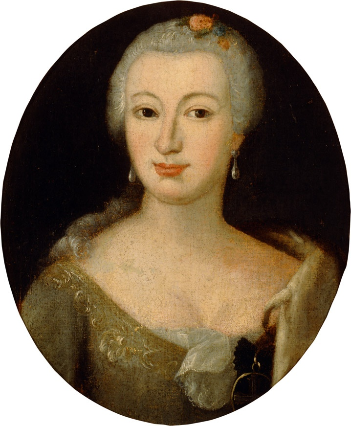 Portrait of Aleksandra Ogińska (1730-1798)label QS:Len,"Portrait of Aleksandra Ogińska (1730-1798)"label QS:Lpl,"Portret Aleksandry Ogińskiej (1730-1798)"